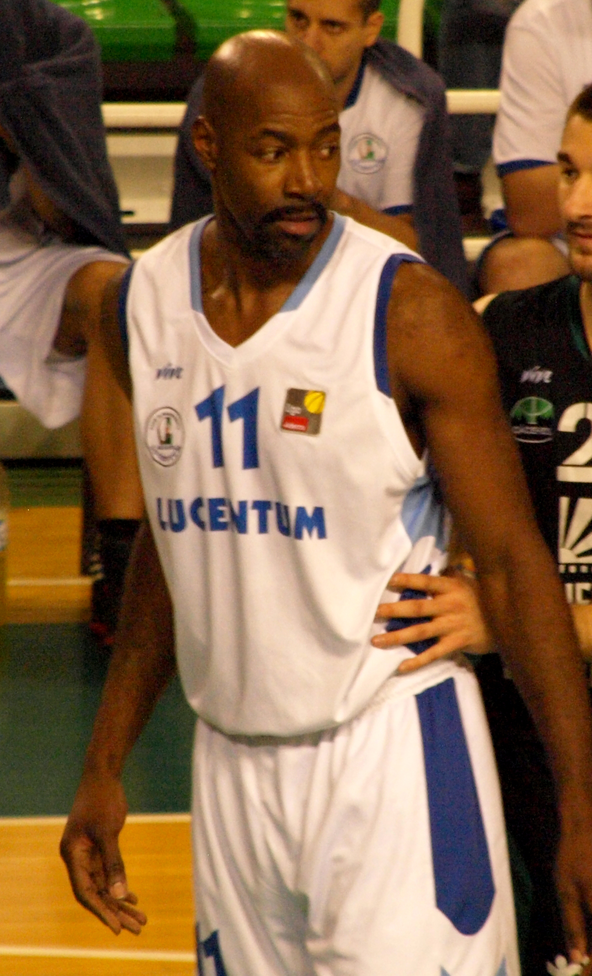 El jugador español de baloncesto Darryl Middleton en un partido con su club, el Lucentum Alicante, en enero de 2013